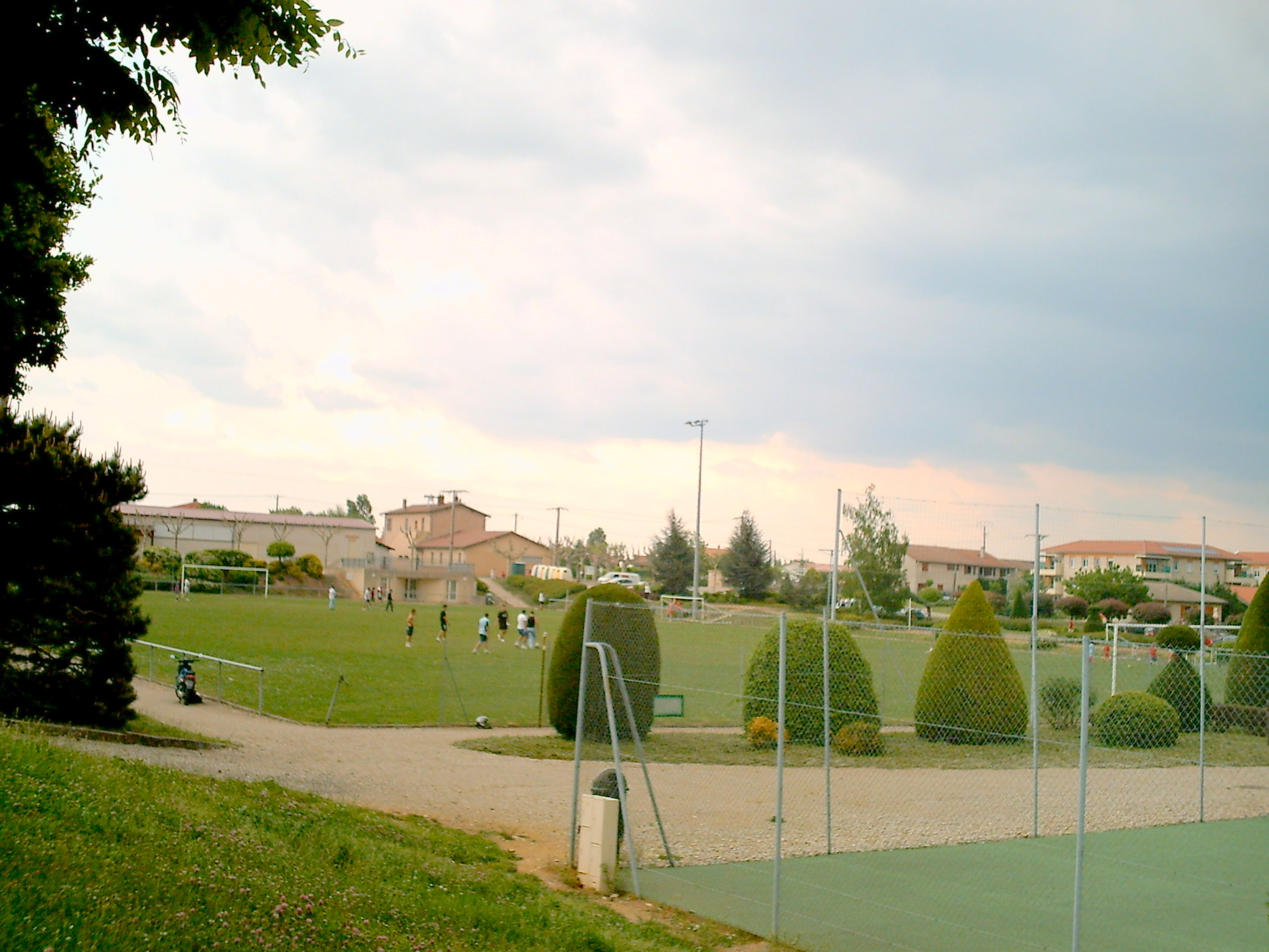 le stade de foot-ball de Serpaize (Isère, France)